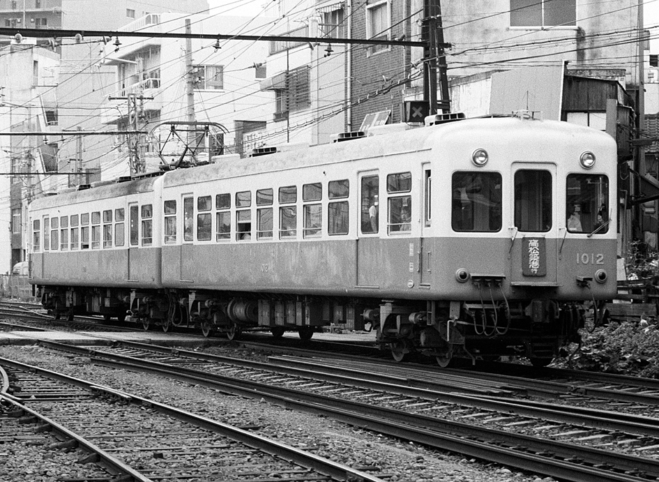 高松琴平電鉄 1012+1011